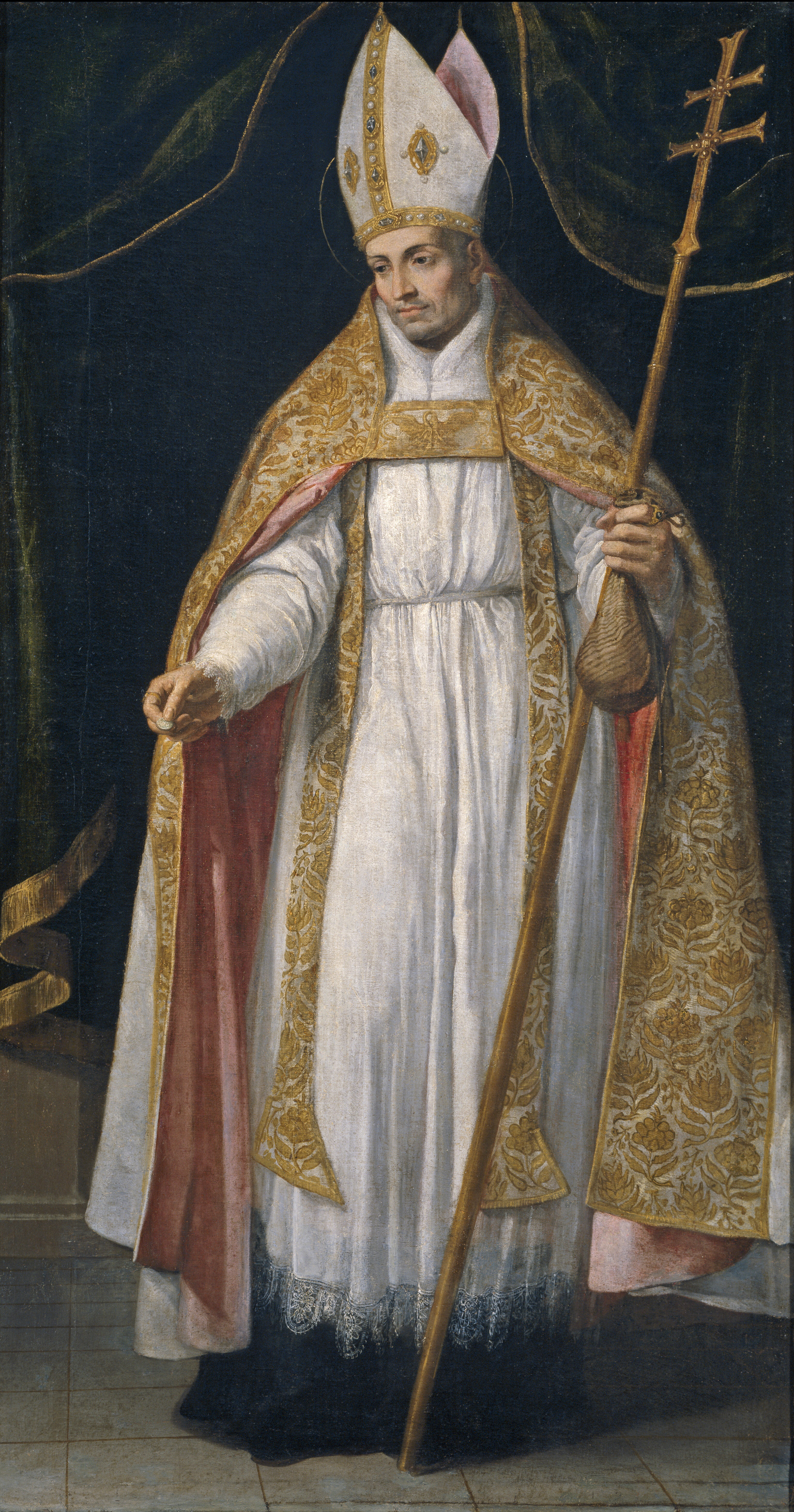 La obra representa al prelado y religioso agustino español Santo Tomás de Villanueva (1488-1555), que llegó a ser arzobispo de Valencia.